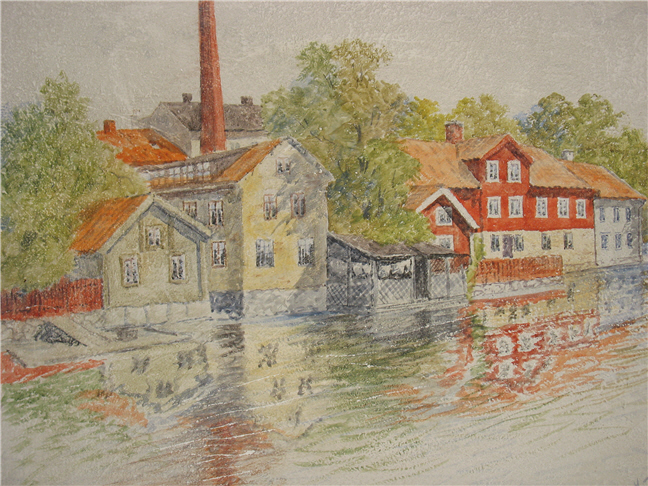 Fresk av Einar Hillberg föreställande Eskilstunaån i Eskilstuna. En av de fresker som Einar Hillberg målade i sin sons, Ove Hillbergs, nybyggda hus i Eskiltuna 1953.